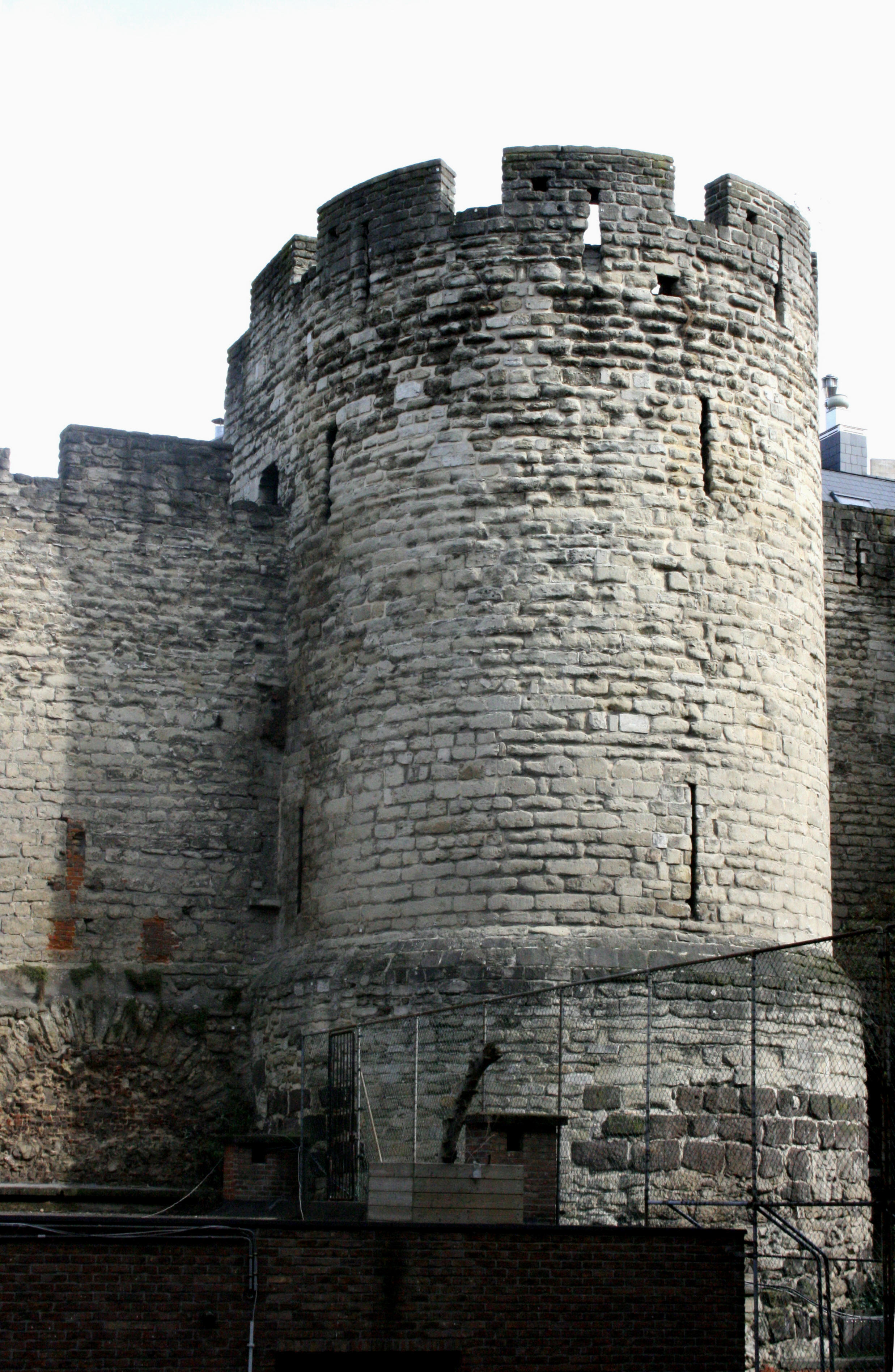 Rue des alexiens 16, Bruxelles (Belgique). Tour de la première enceinte de Bruxelles (extra muros) dans la cour de la Sint-Jorisbasisschool